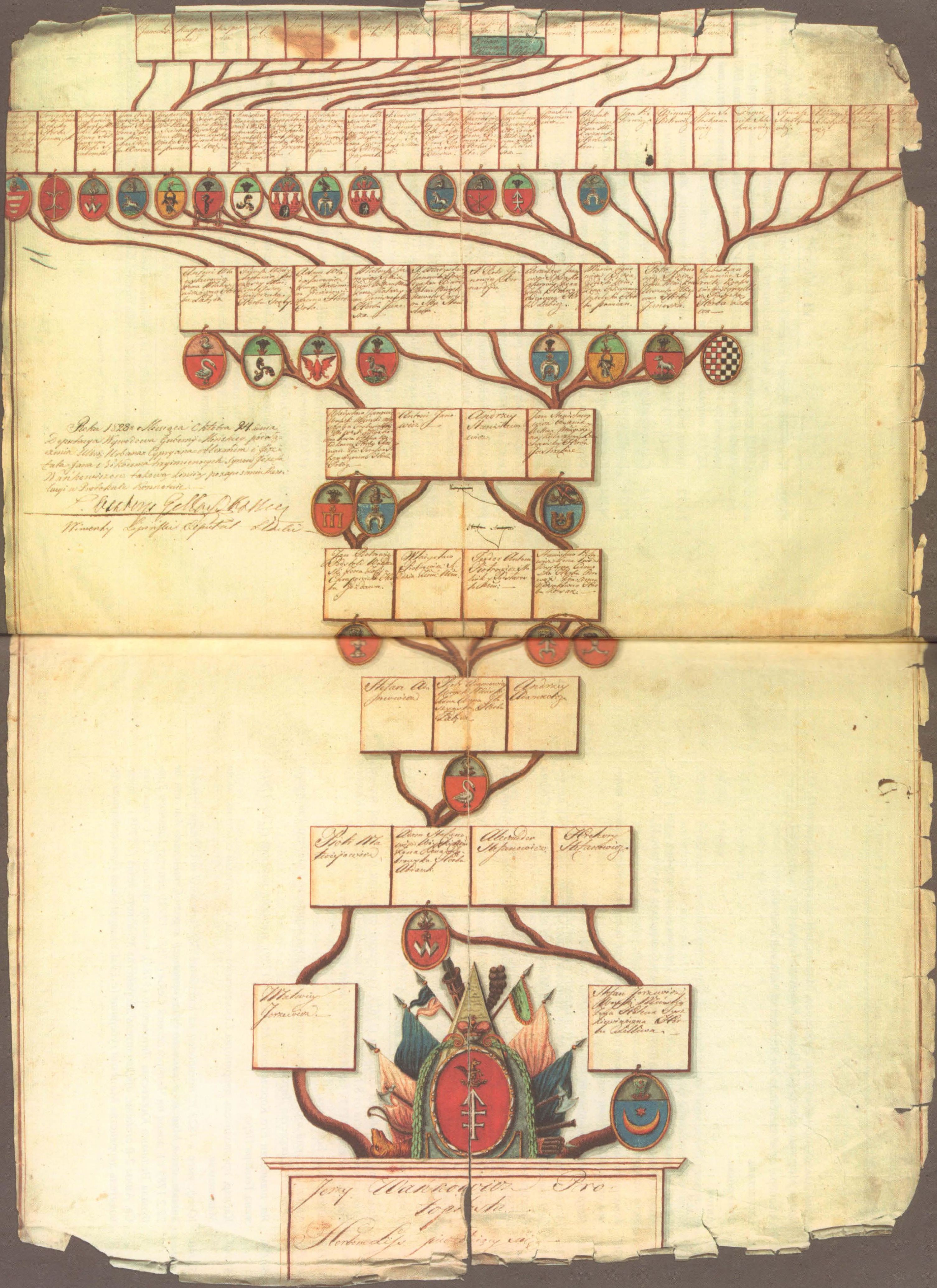 Беларуская (тарашкевіца): Ваньковічы (Vańkovičy), генэалёгія